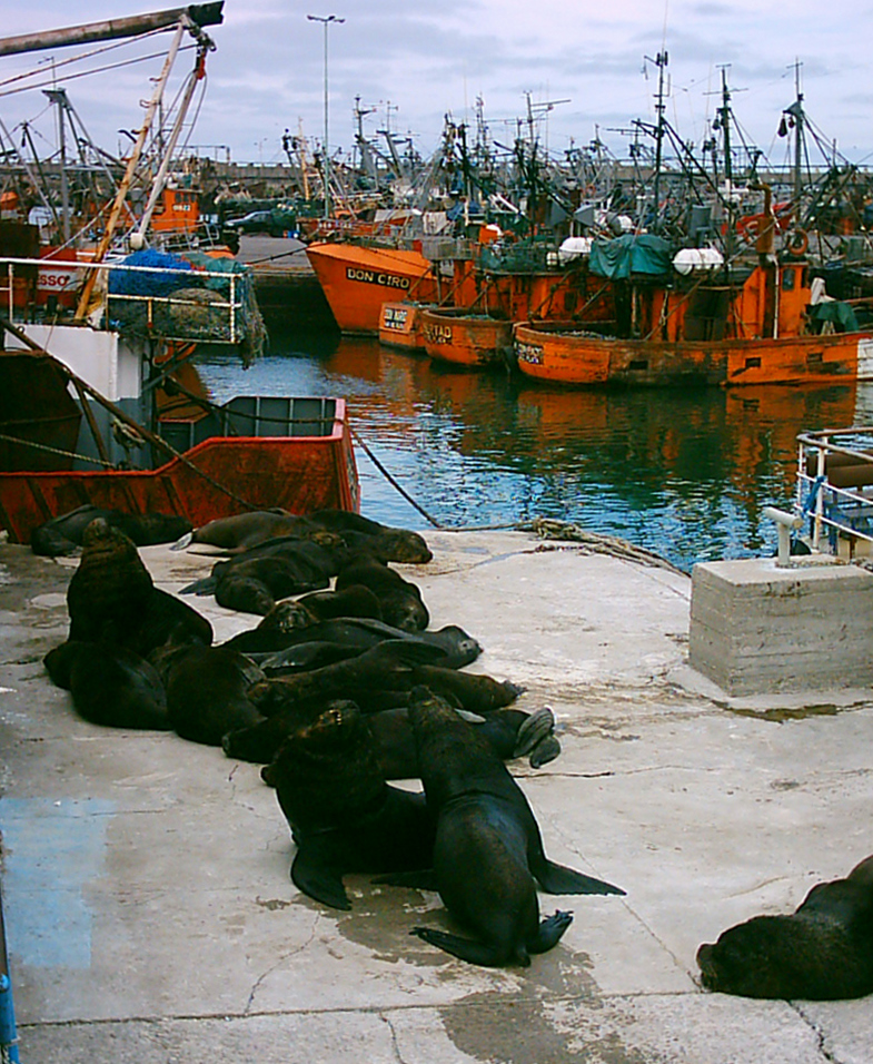 Lobos marinos Otaria flavescens en el puerto de Mar del PlataTemplate: Otaria flavescens at the Mar del Plata seaport